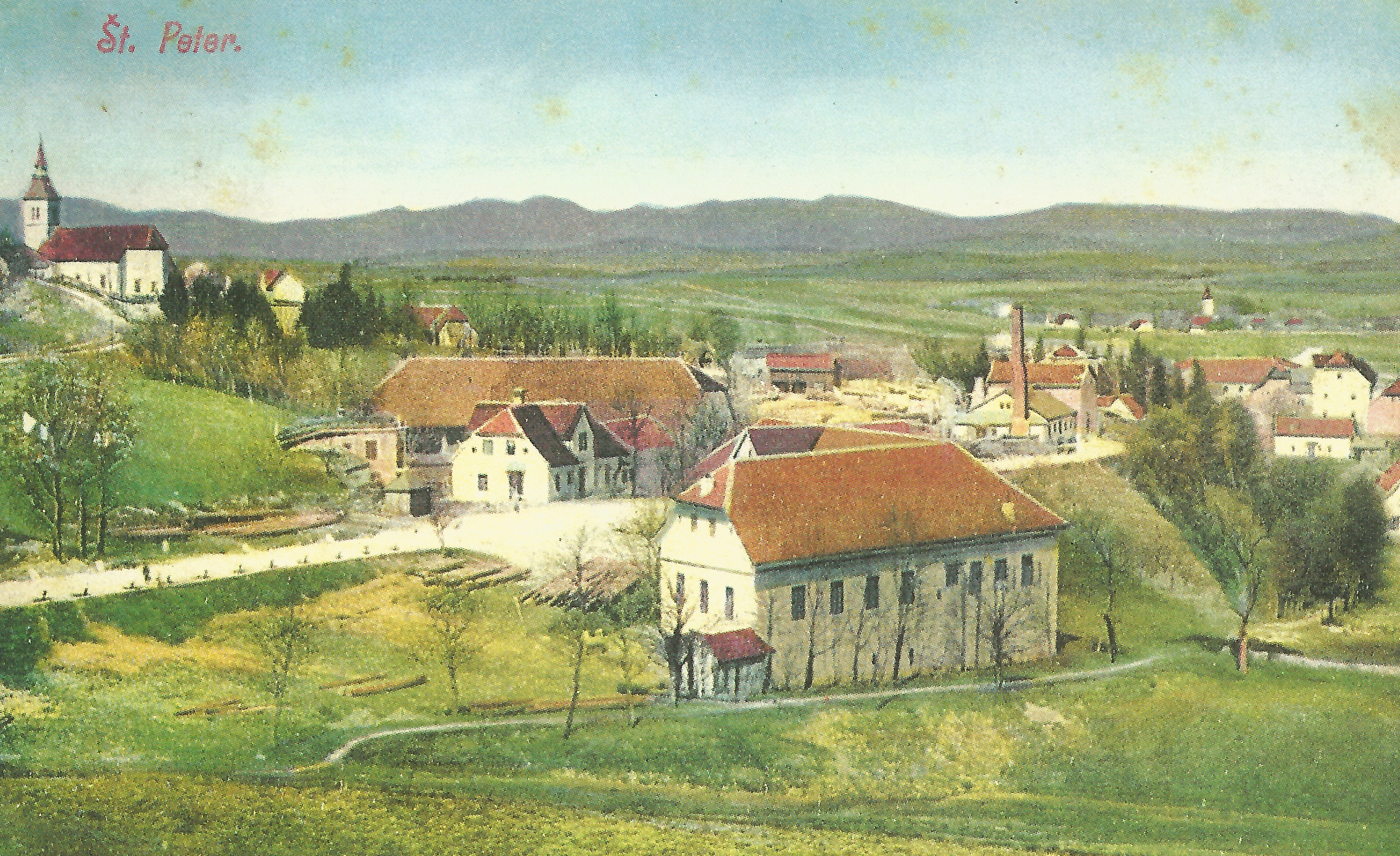 Razglednica Pivke.